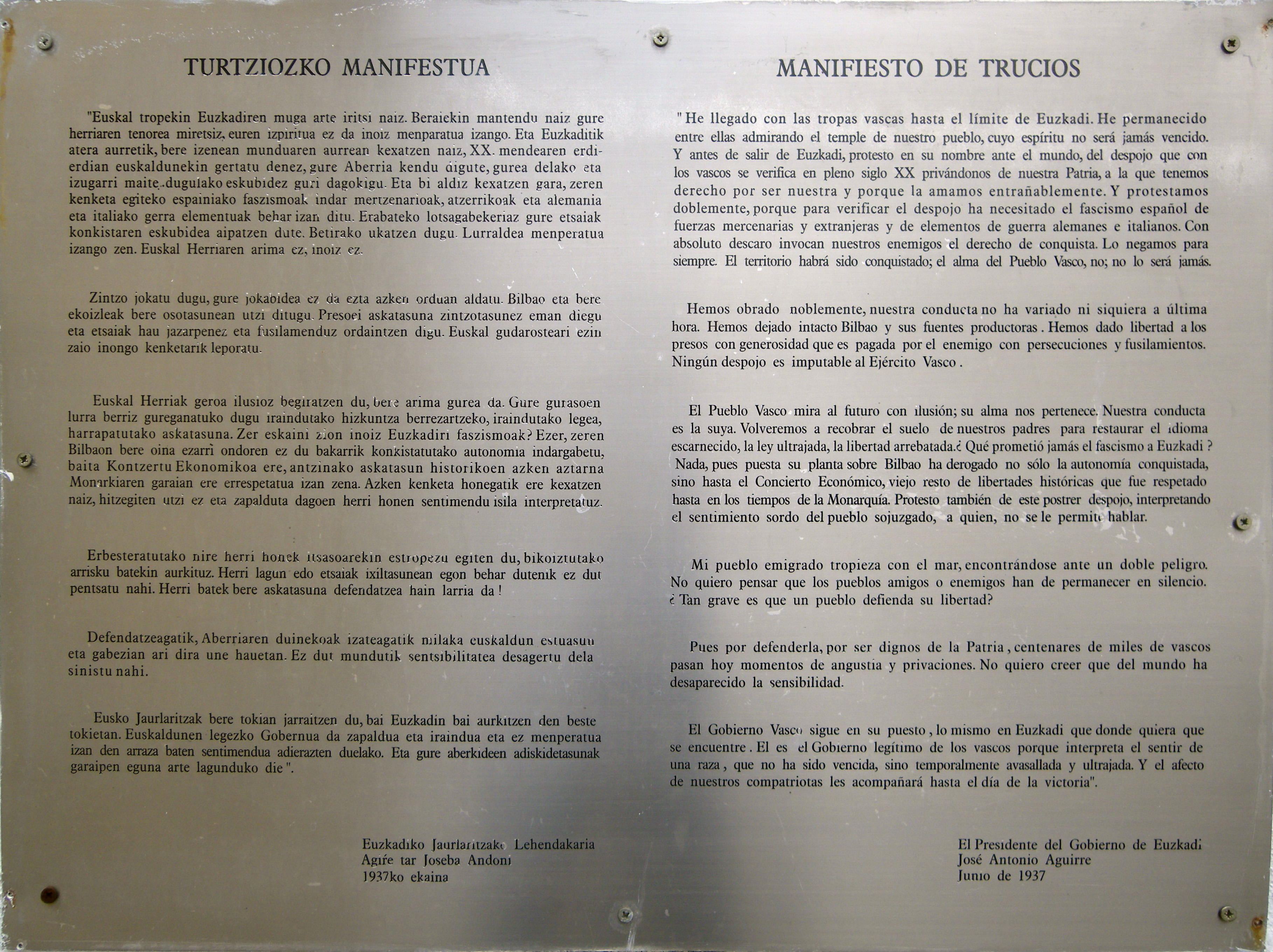 Turtziozko Manifestua Euzkadiko Jaurlaritzako Lehendakaria Agirre tar Joseba Andoni 1937ko ekaina